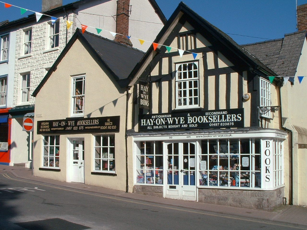 Eigen foto